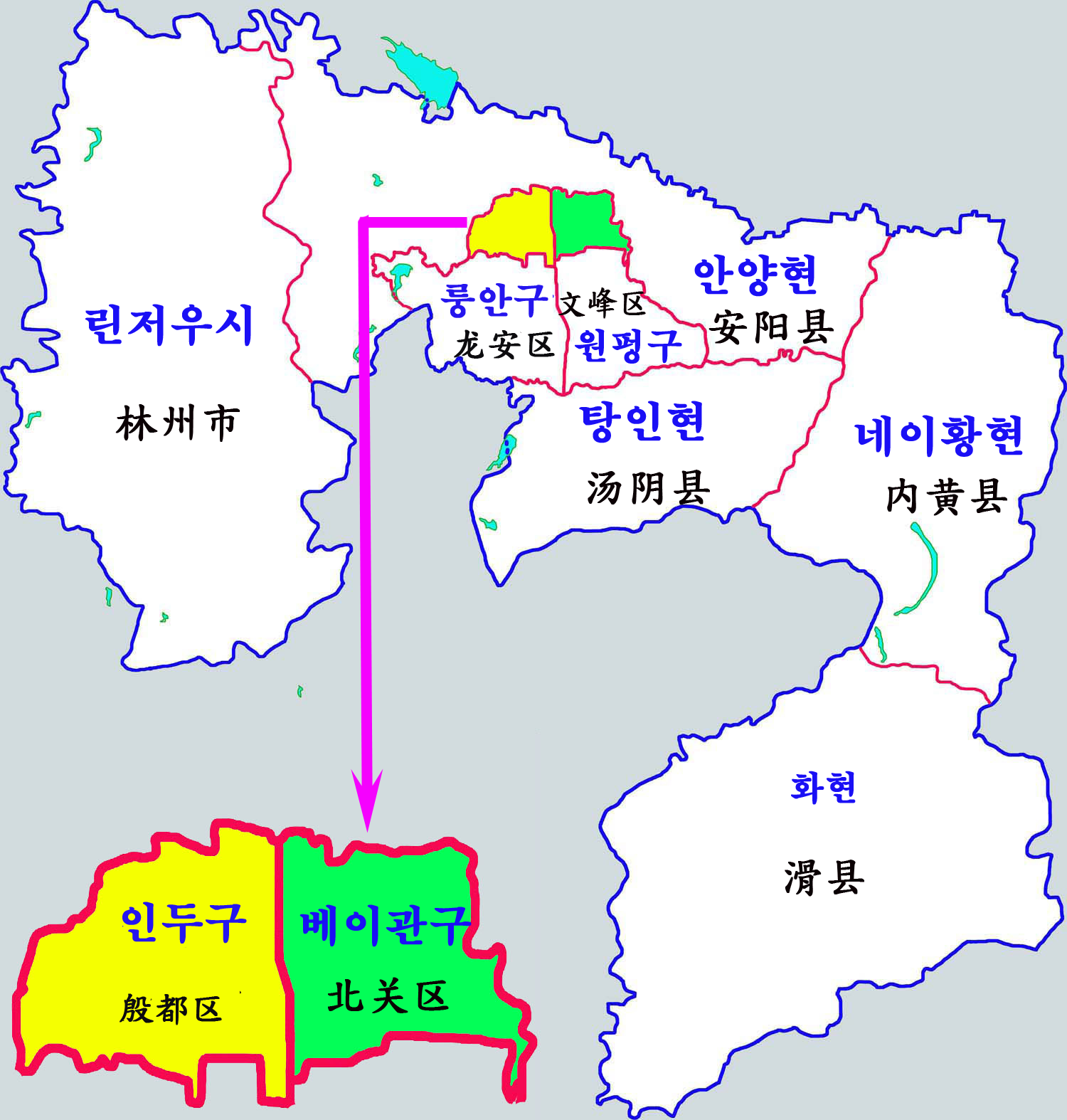 안양시 현급행정구역도